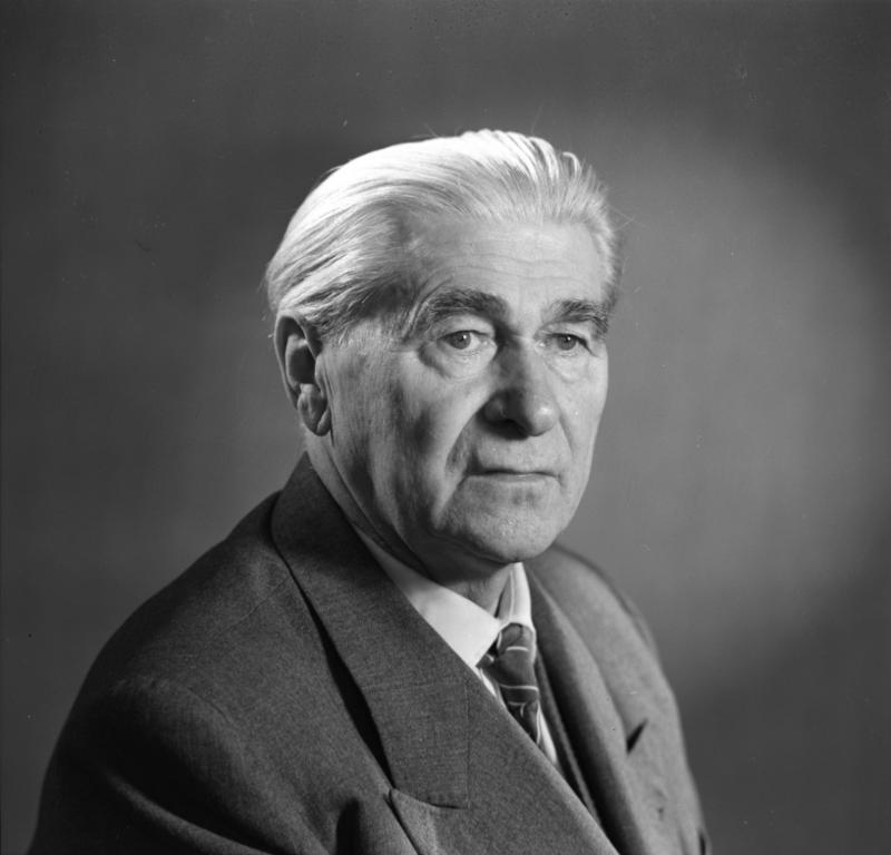 Zentralbild-Hesse 31.5.1968 Robert Siewert, Parteiveteran